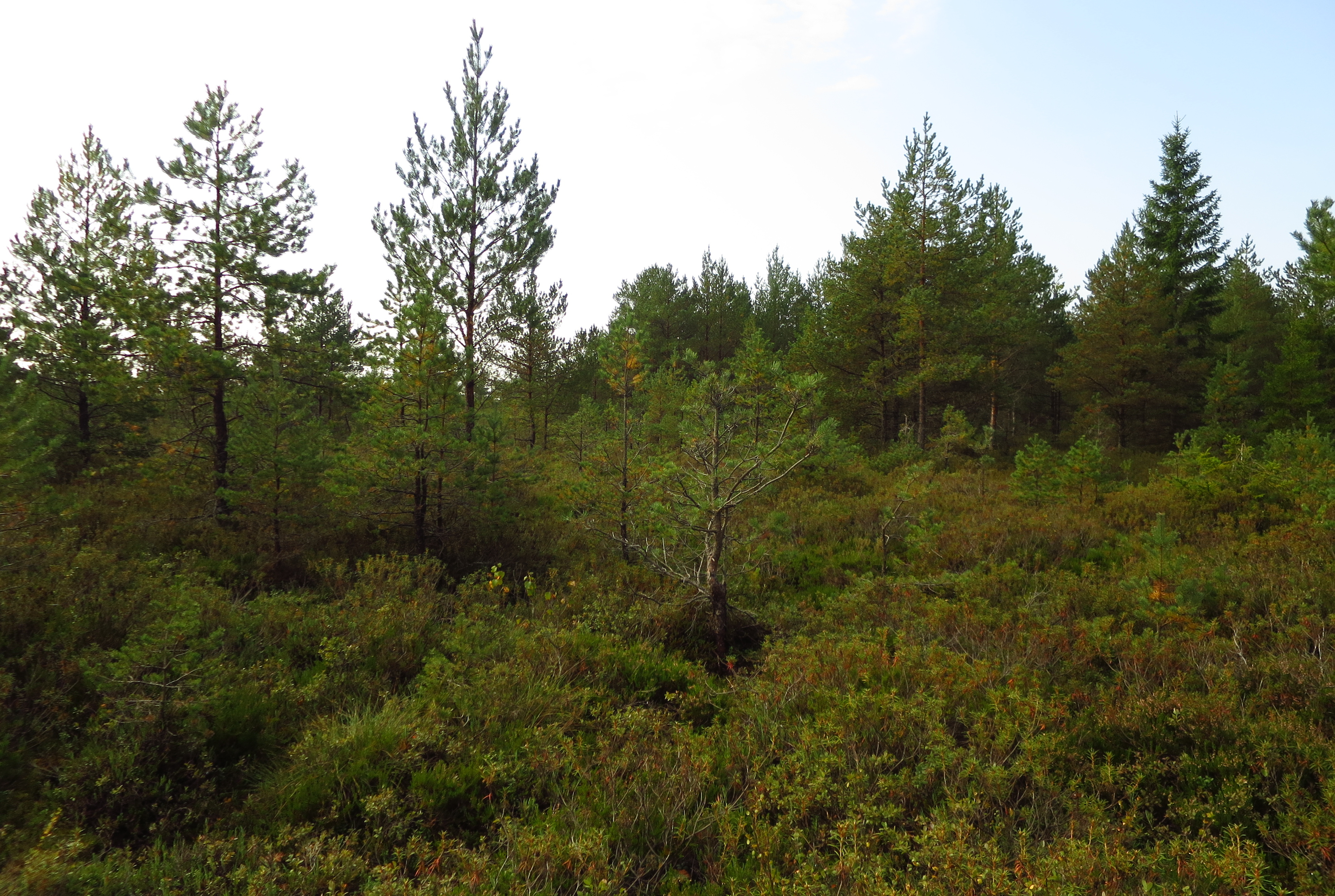 Niibi raba säilinud idaserv